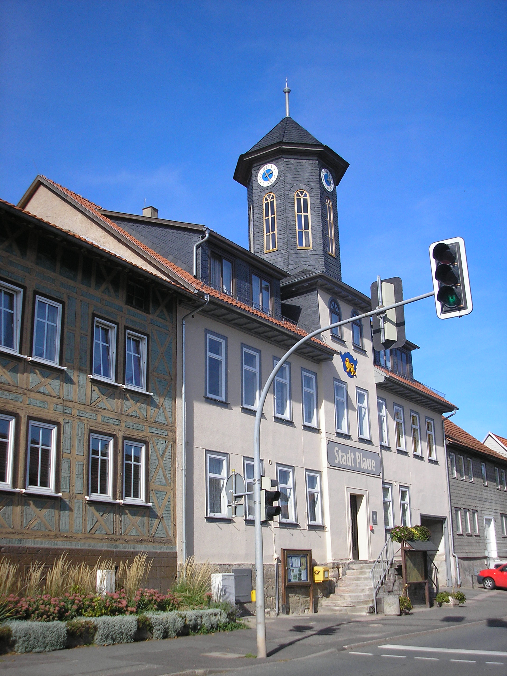 Das Rathaus in Plaue (Thüringen).